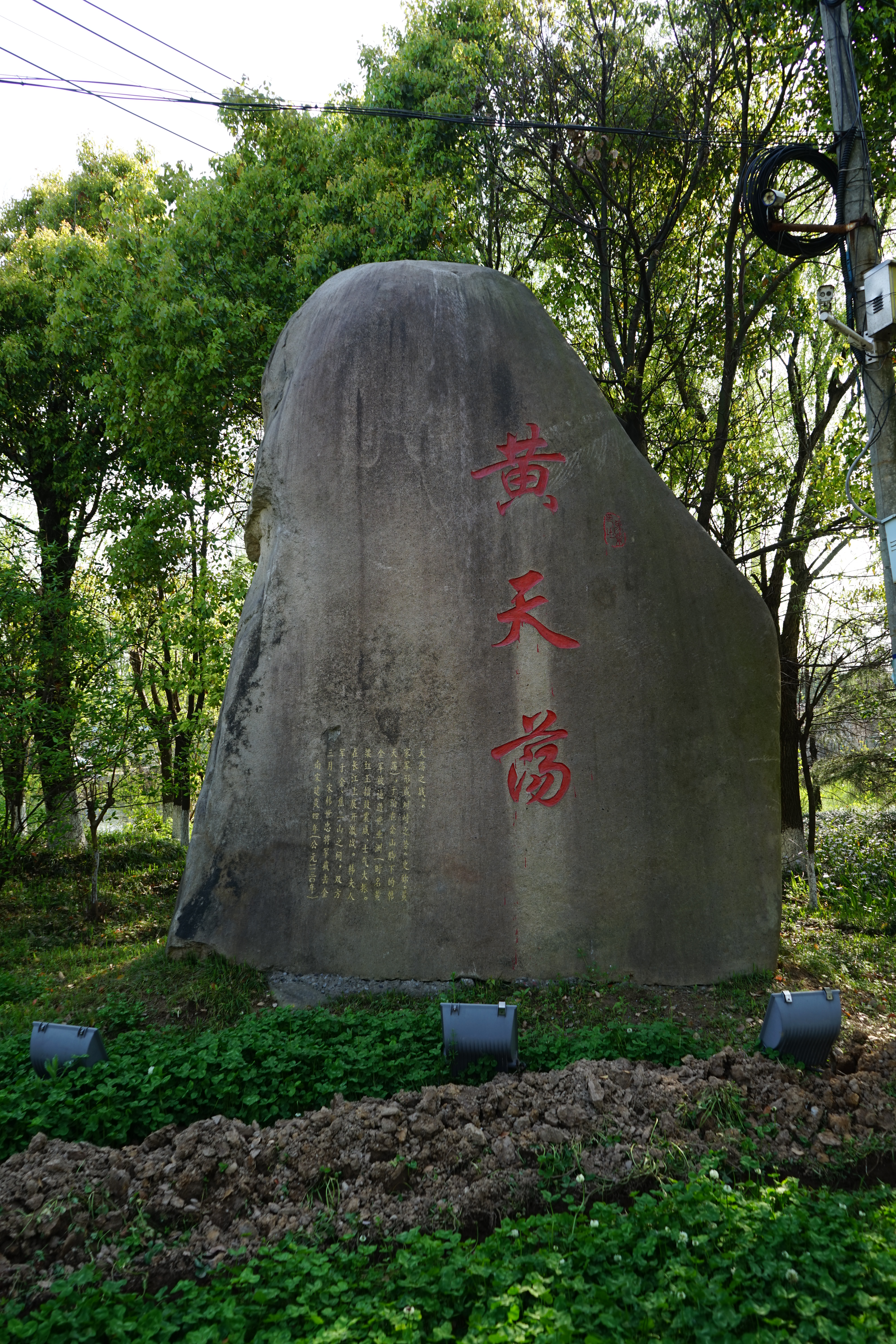 立于世业洲上的“黄天荡”石碑。北宋时世业洲被称为黄天荡，在此发生了黄天荡之战